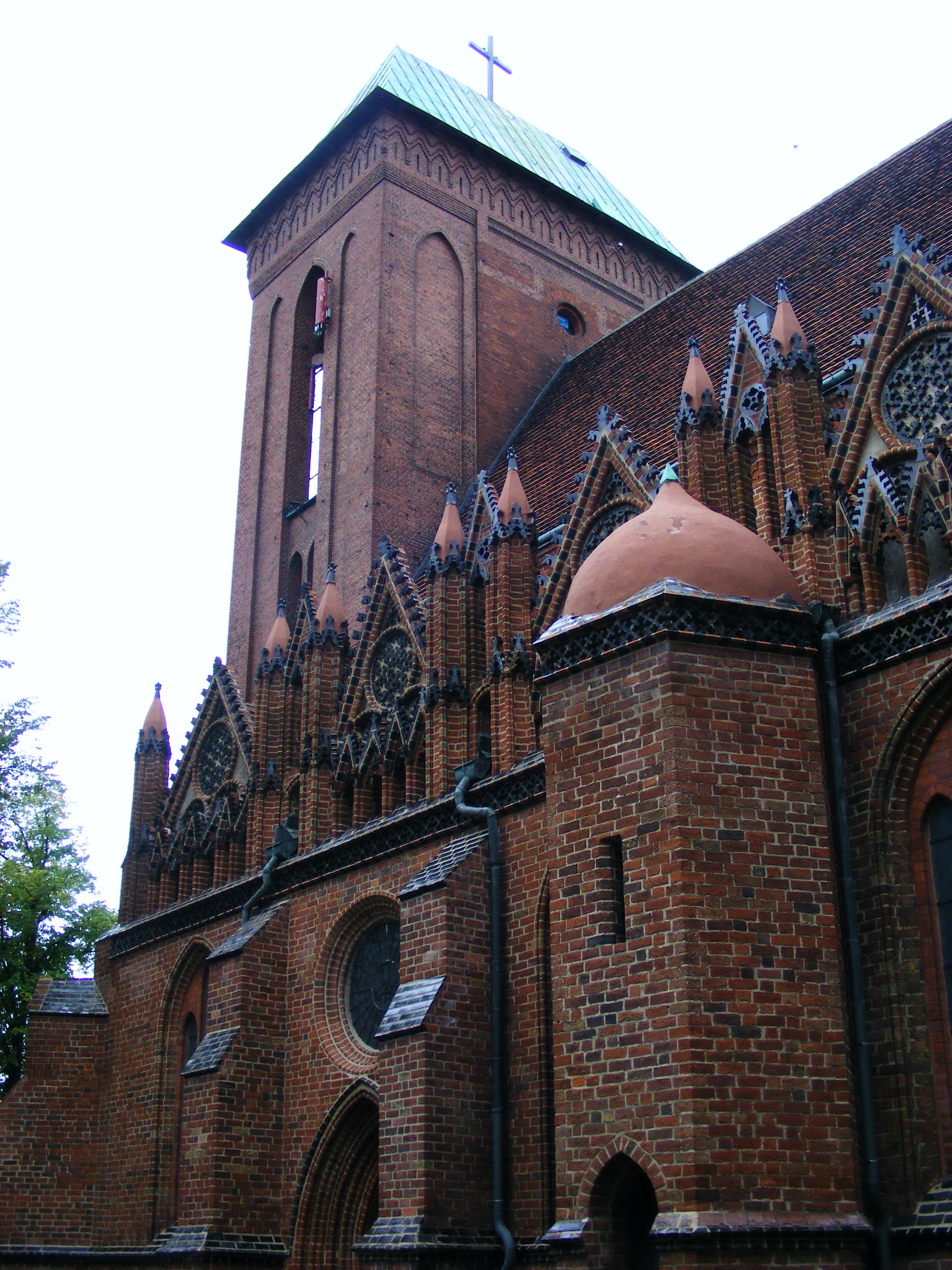 Konkatedra św. Jana Chrzciciela w Kamieniu Pomorskim.